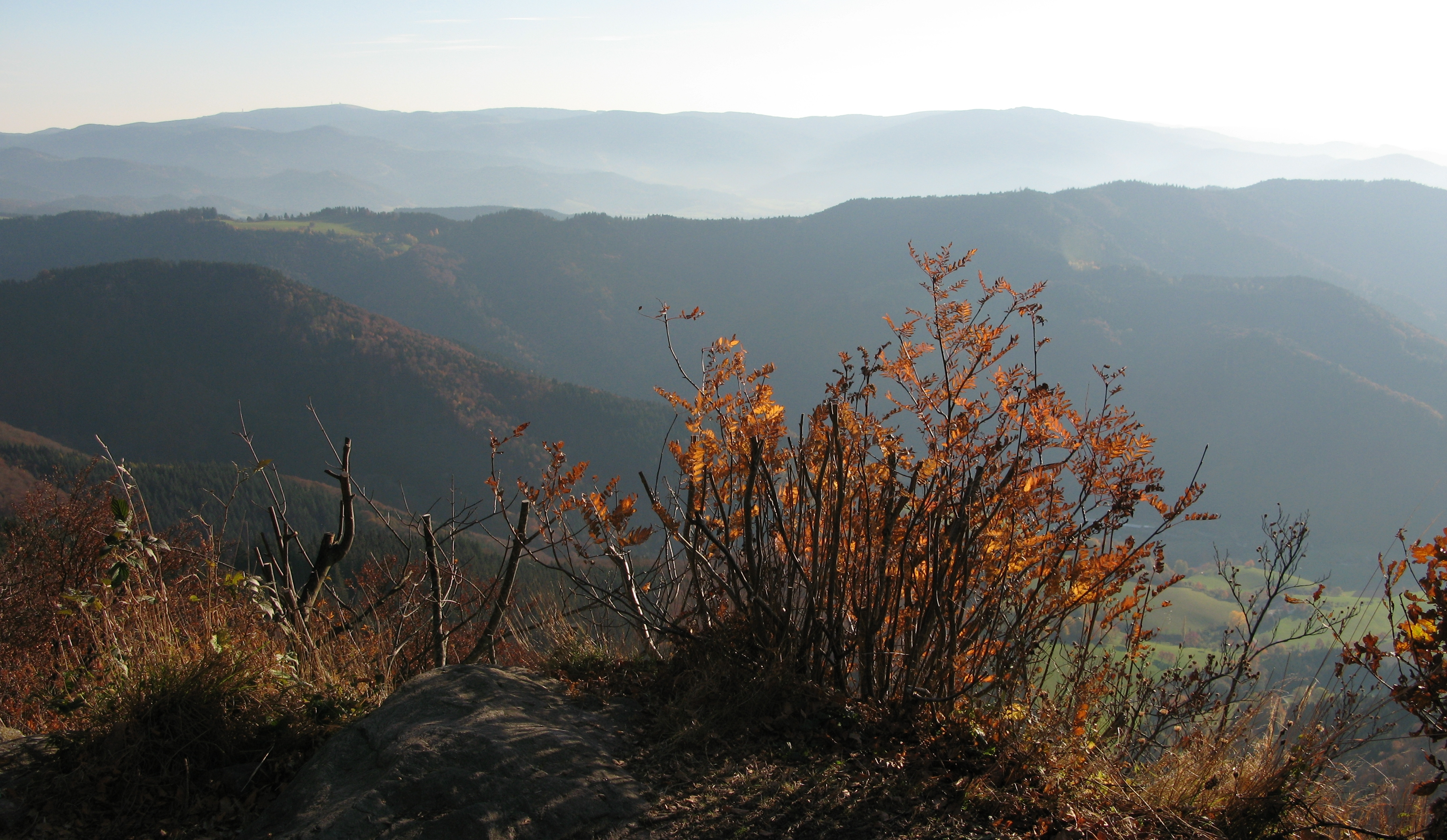 Panorama von der Thomashütte unterhalb des Kandels am Zweitälersteig im Schwarzwald.